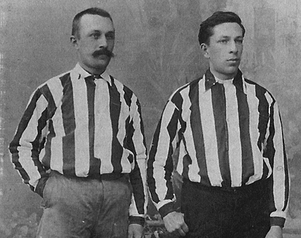 Broeders Han en Johan Dade.